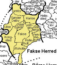 Fakse Herred Præstø Amt , Denmark.